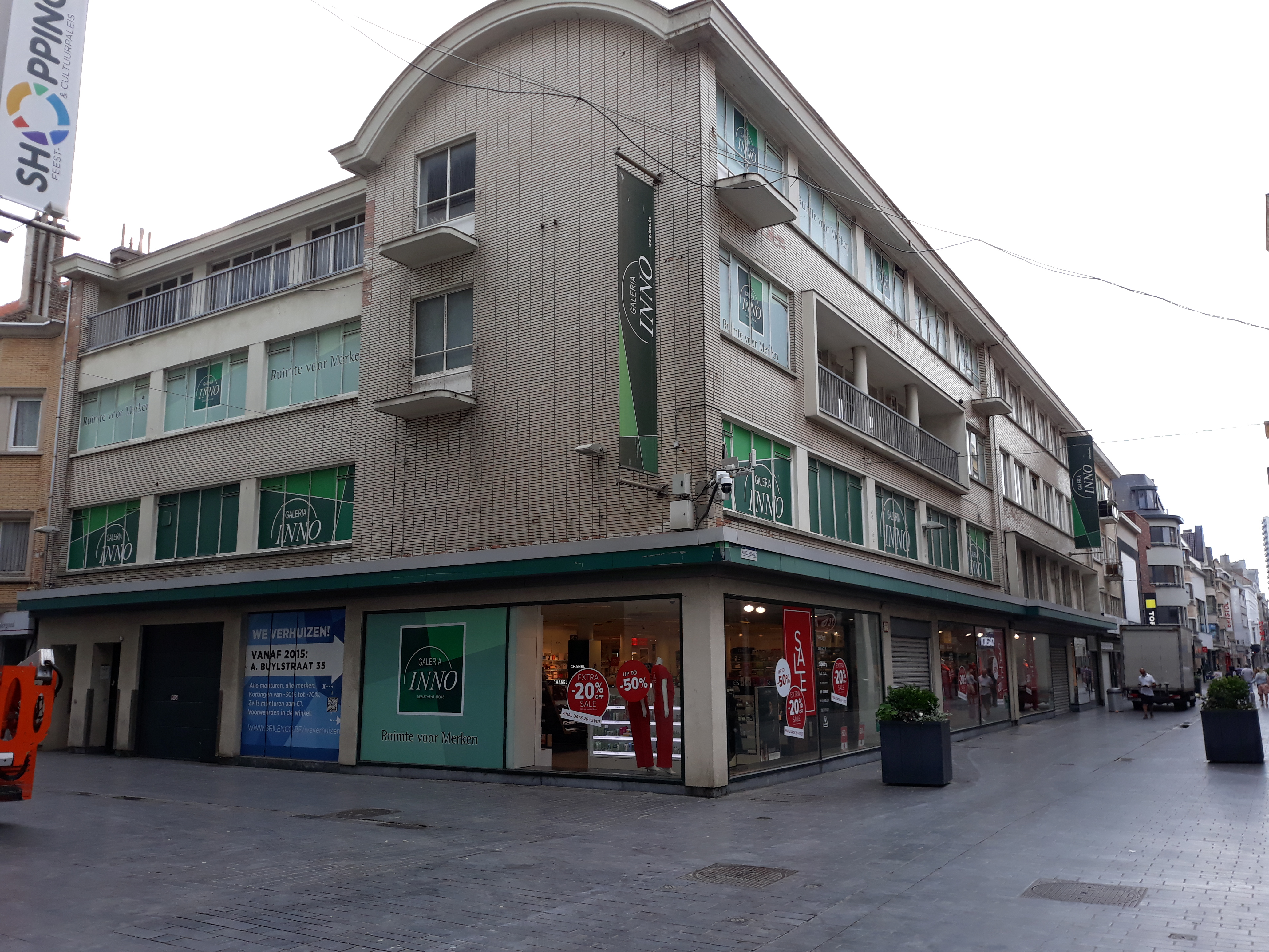 Filiaal van Galeria Inno in de Kapellestraat te Oostende (hoek met Witte Nonnenstraat)